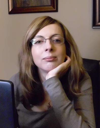 Яна Борисова е писател, драматург и сценарист.